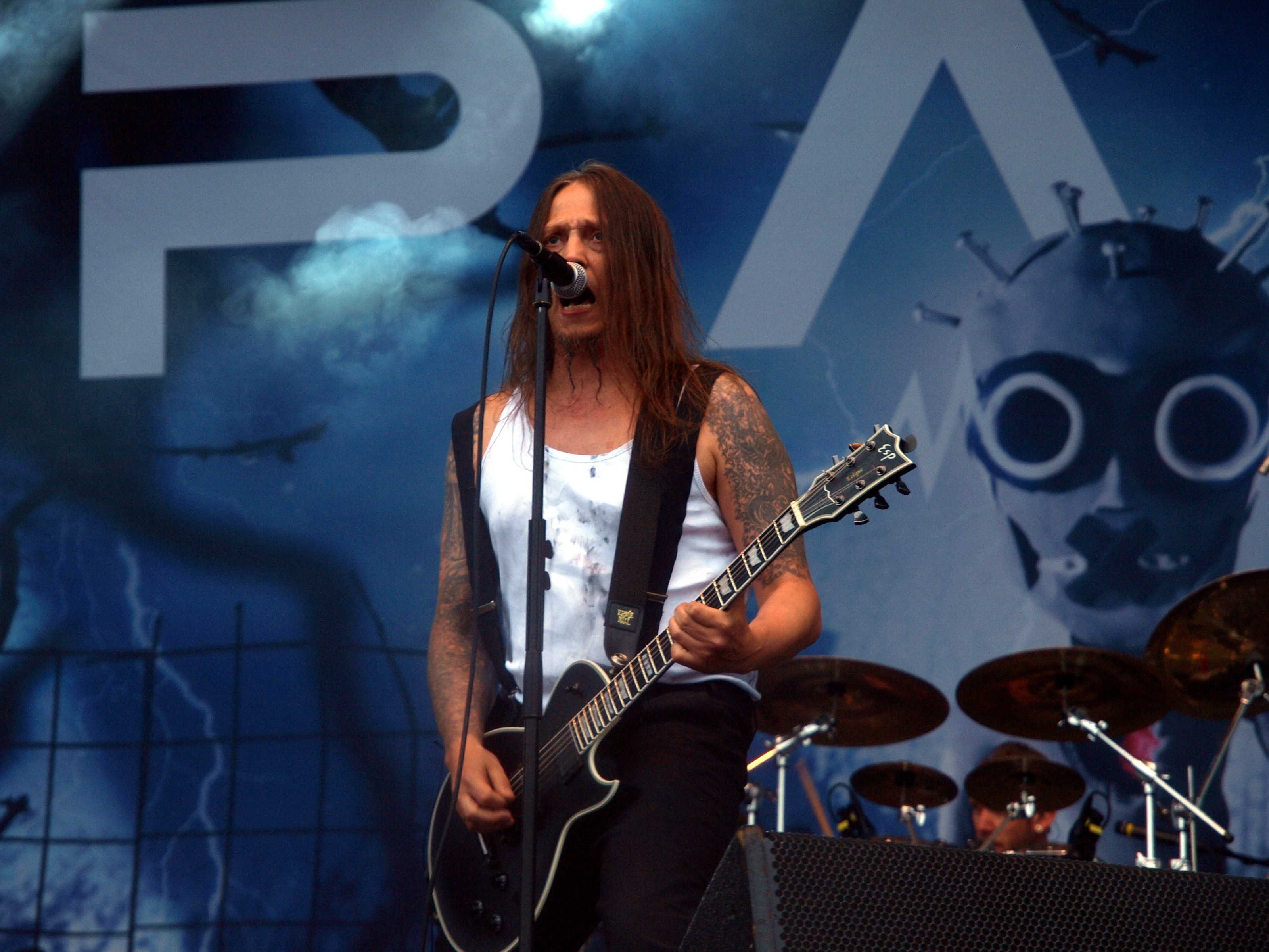 Pain live am Myötätuulirock 2011